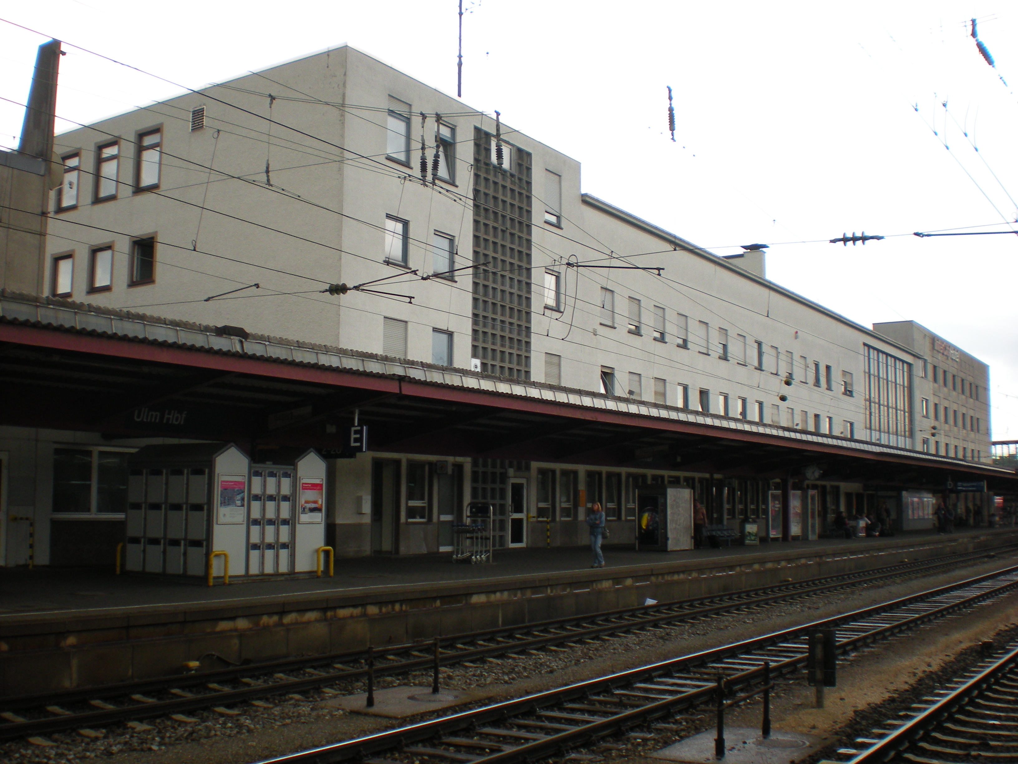 Gleisseite des Empfangsgebäudes am Ulmer Hauptbahnhof